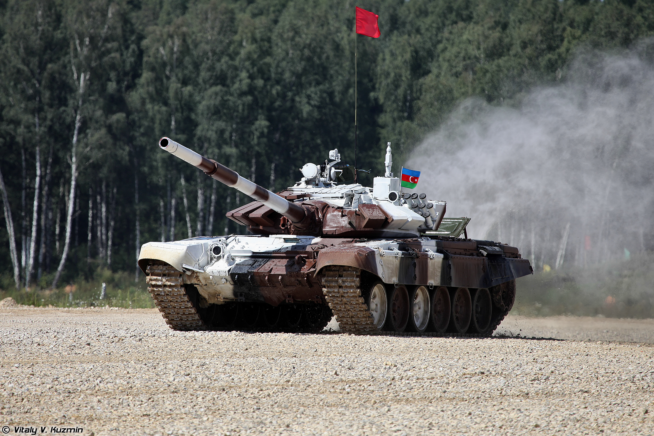 Т-72Б3 Азербайджан (T-72B3 Azerbaijan)